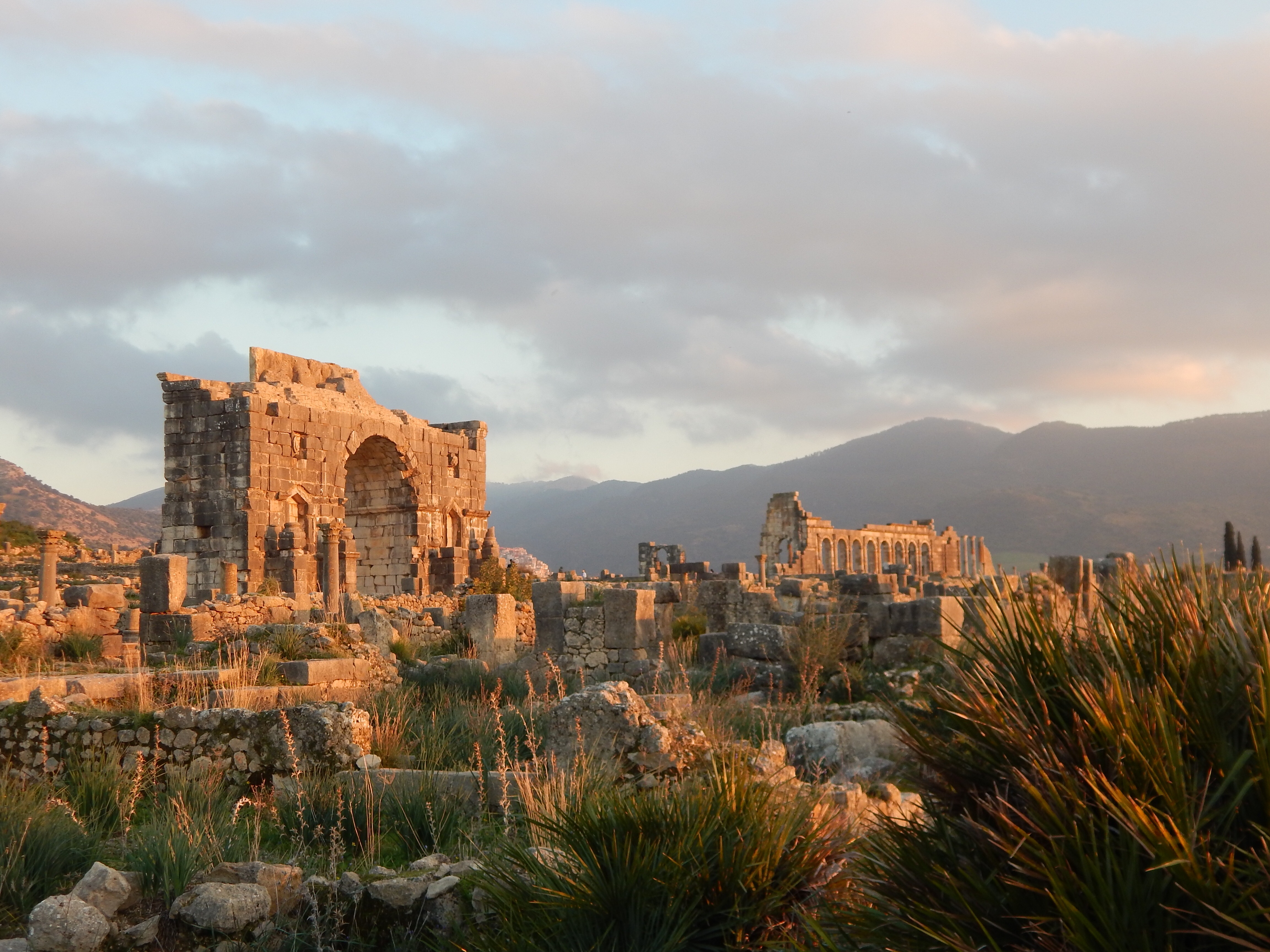 غروب الشمس على موقع وليلي الأثري